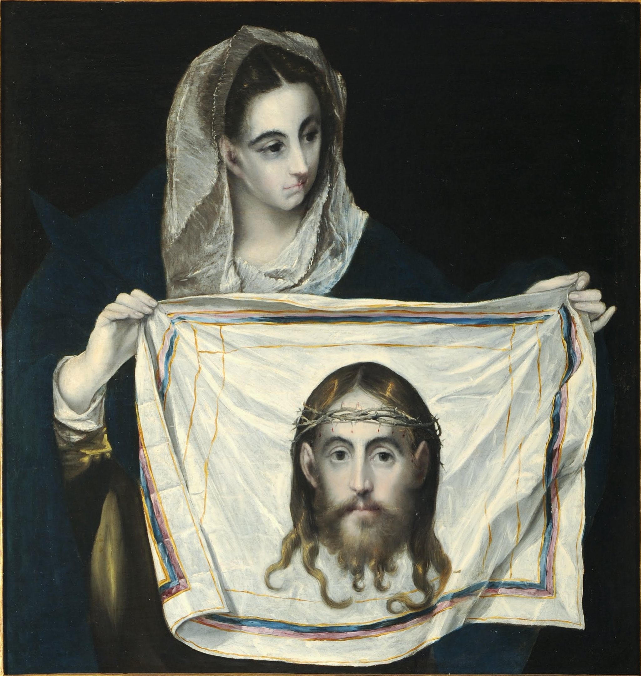 La obra representa a Santa Verónica contemplando el paño de la Santa Faz, en el que aparece el rostro de Jesucristo.